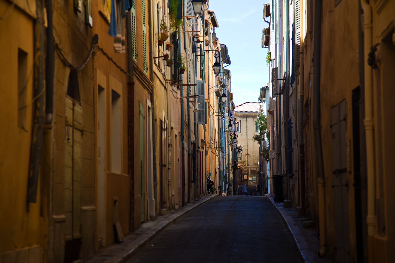 Ruelle dans le quartier du Panier à Marseille.